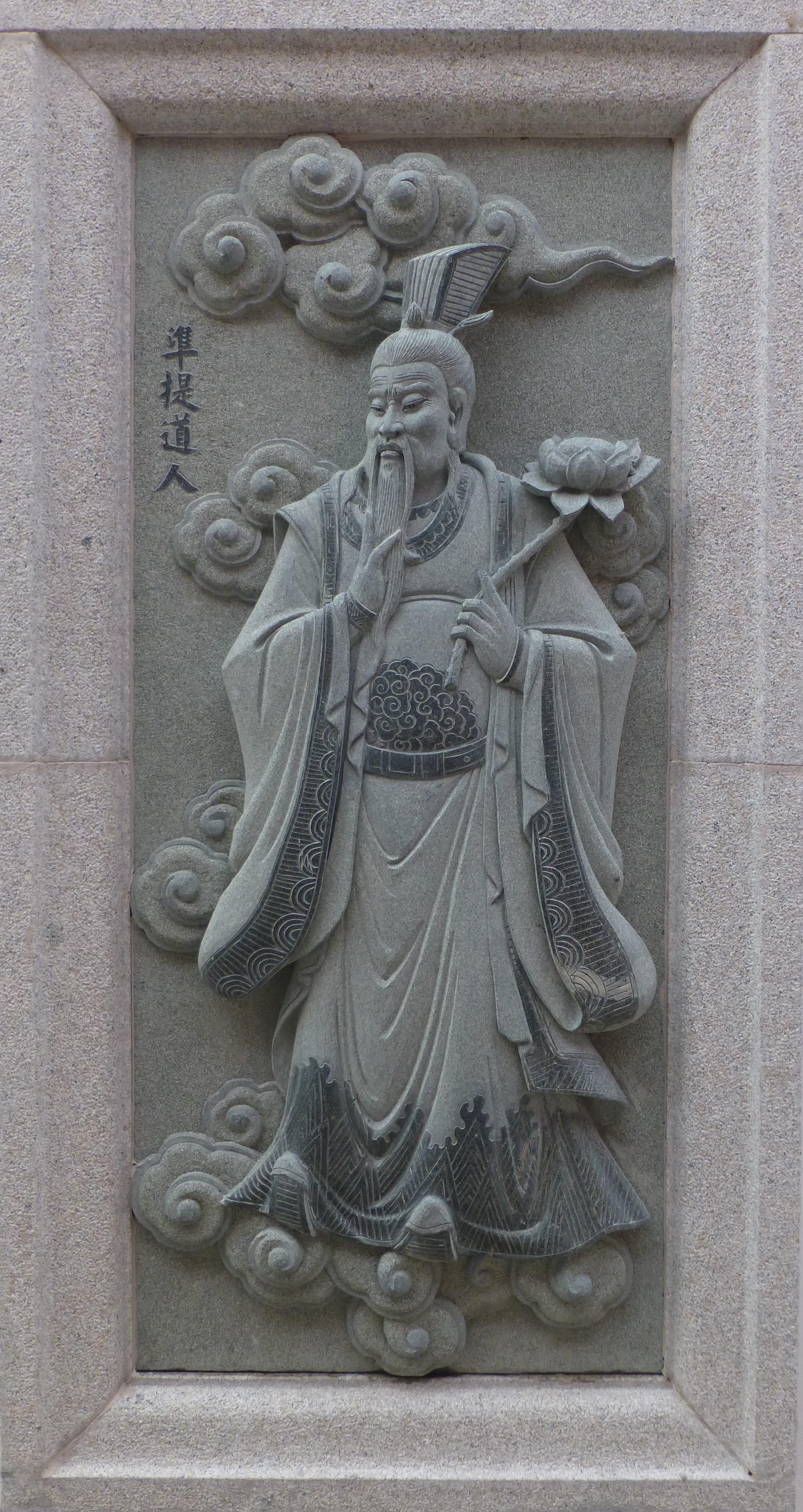 015 Zhun ti dao ren, Investiture of the Gods at Ping Sien Si, Pasir Panjang, Perak, Malaysia Photograph from the Ping Sien Si Temple in Perak, Malaysia taken by Anandajoti.